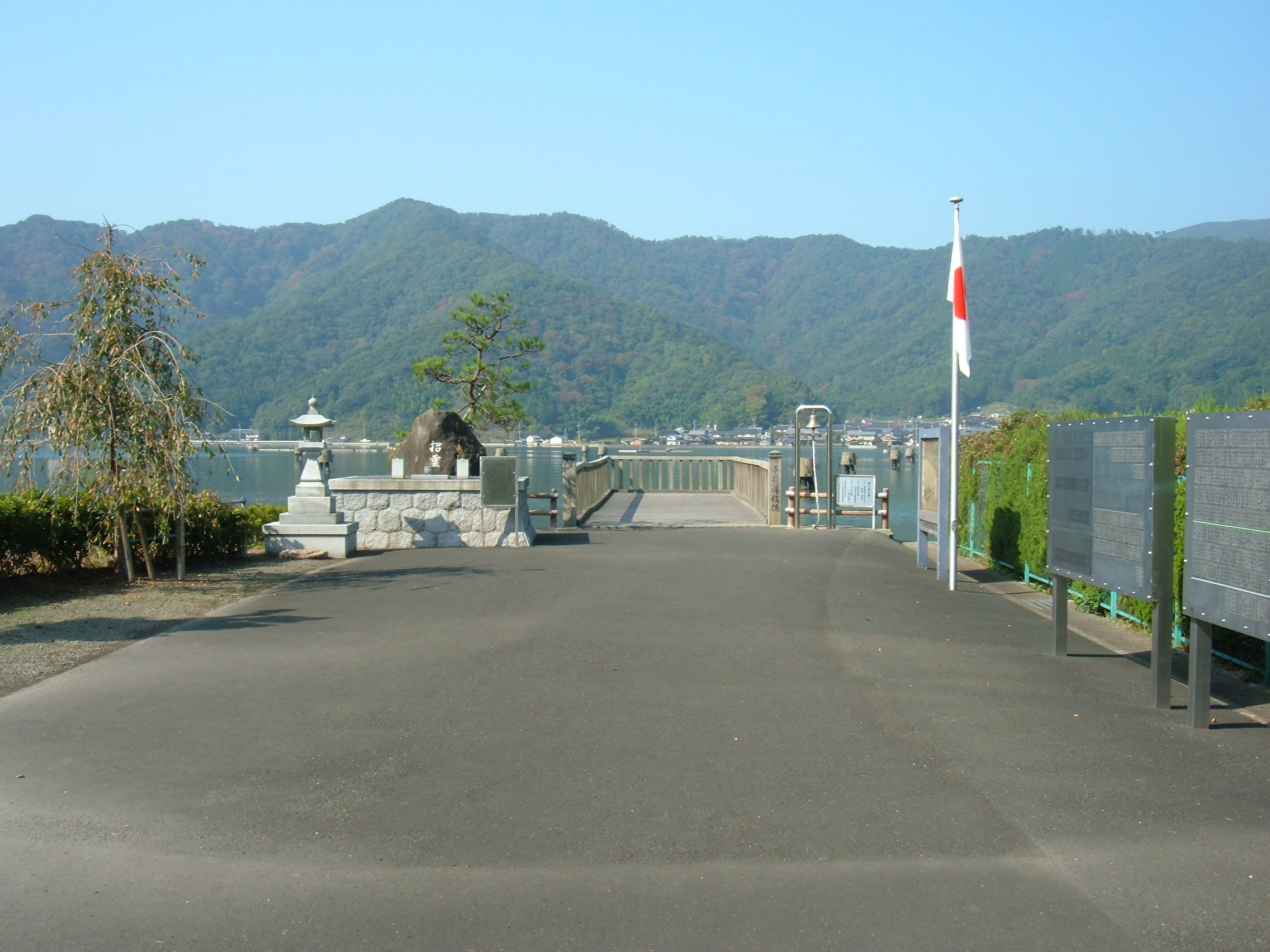 引揚記念公園（舞鶴市）、平桟橋（復元）